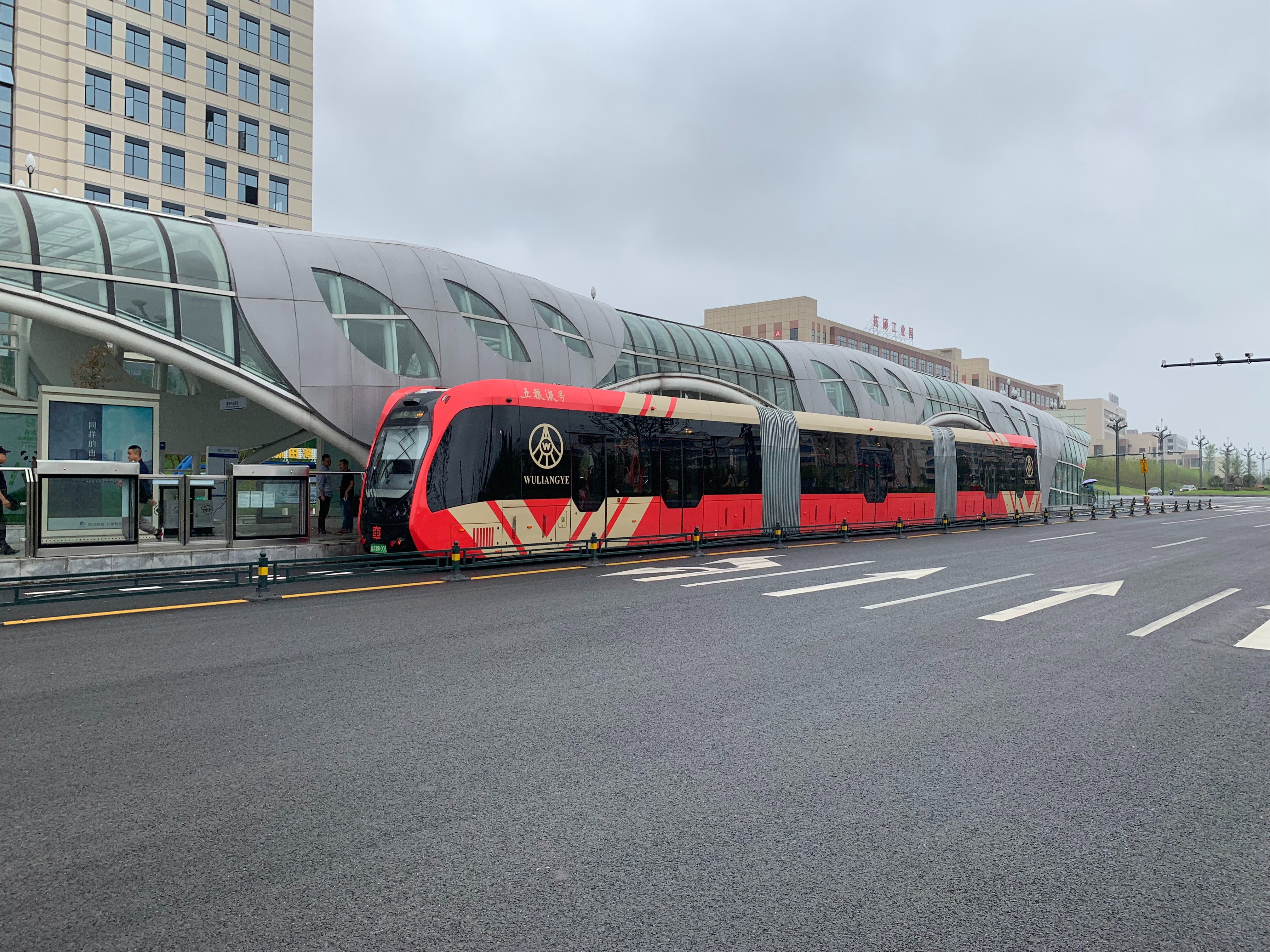 宜宾智轨系统